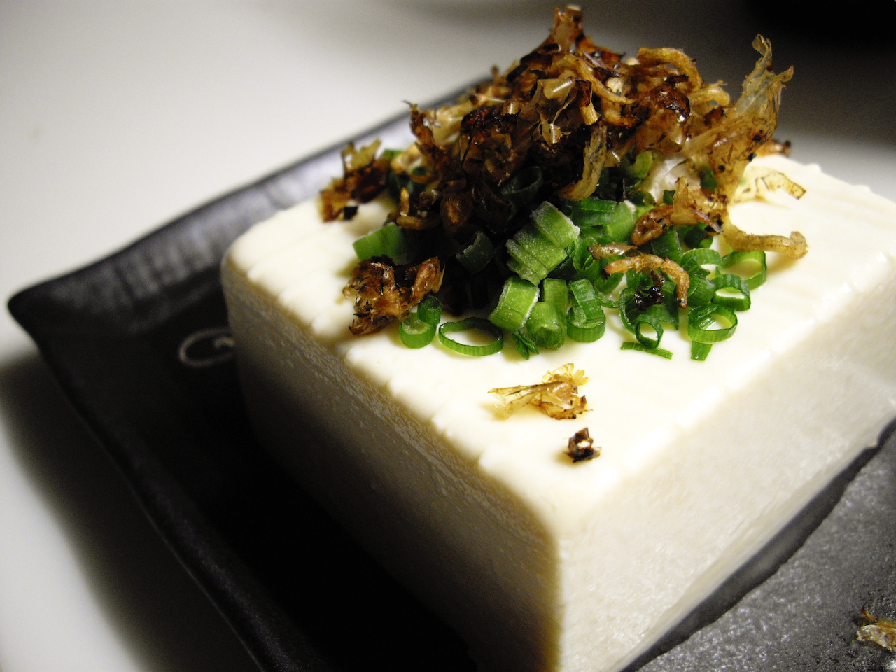 今夜はつまみに冷や奴。 上に乗ってるのは、出汁を取った後の削り節としらすで作ったご飯の友